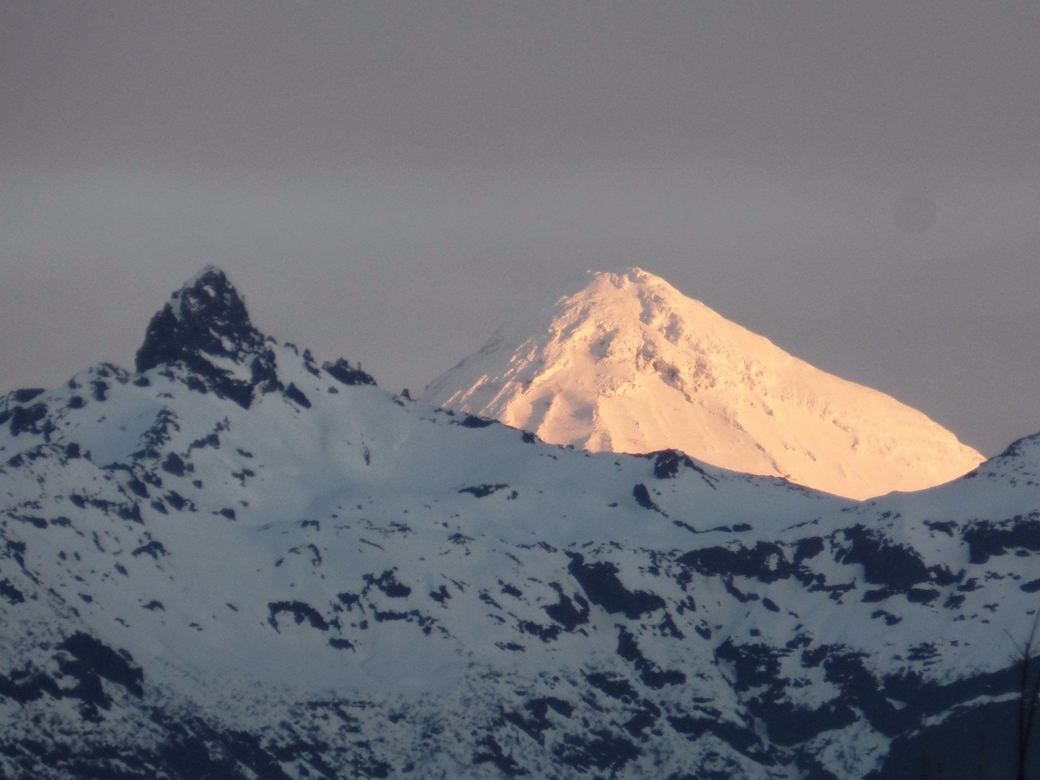 Cerro Quinquilil / Colmillo del Diablo / sendero oculto de Puesco en Parque Nacional Villarrica #Lanin